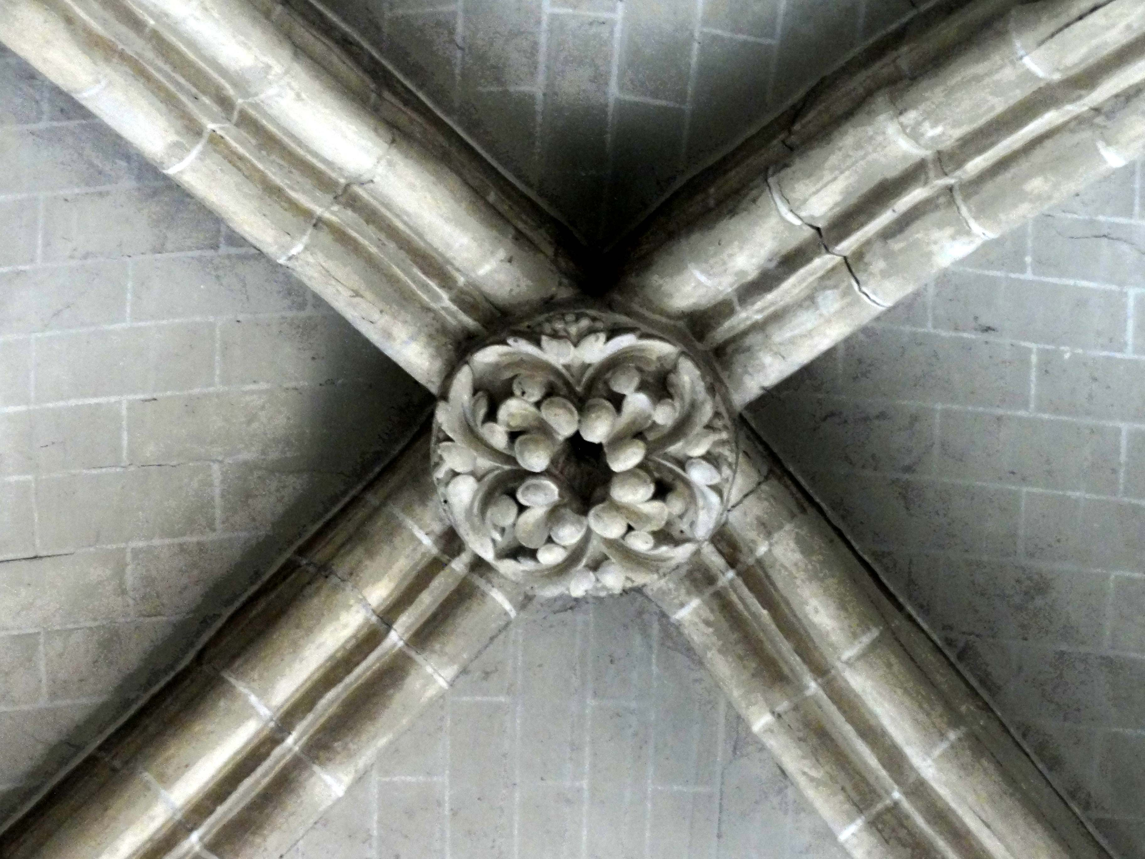 Clé de voûte de l'église (voir titre).